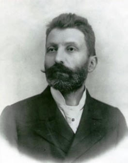 Badics Ferenc magyar irodalomtörténész, a Magyar Tudományos Akadémia tagja.